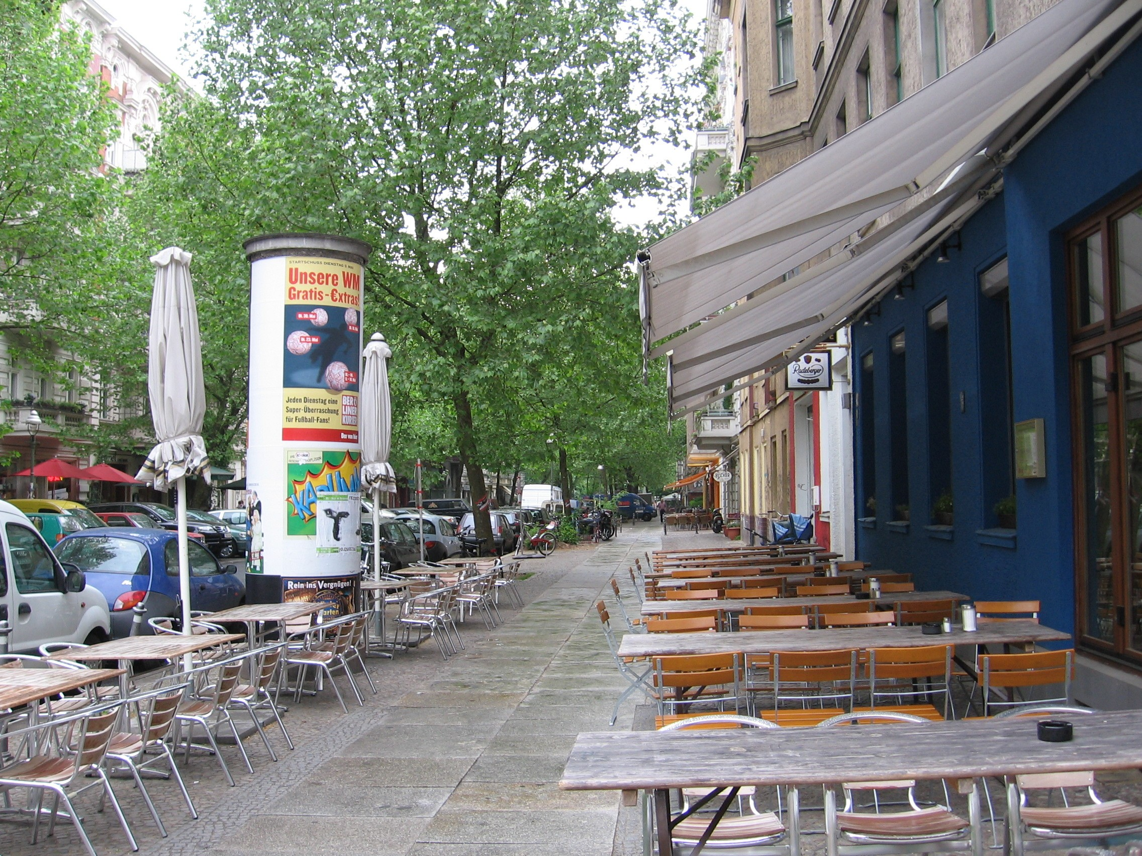 Straßencafés und Litfaßsäule in der Dieffenbachstraße